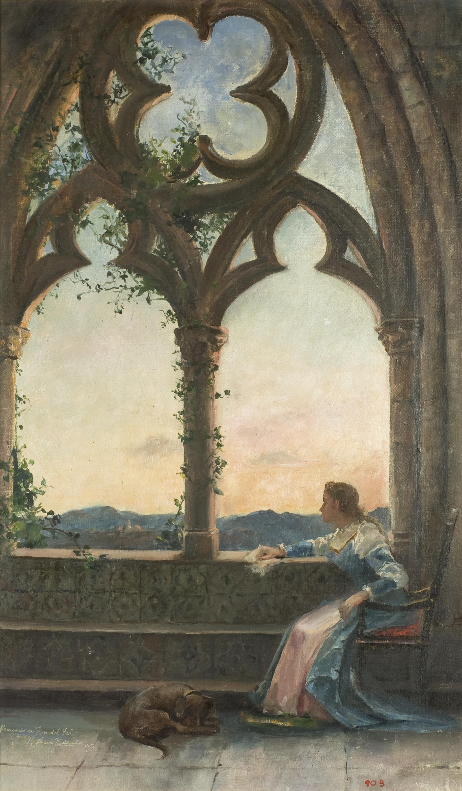 Pintura del segle XIX que segueix el corrent natzarè de retorn a allò medieval. Escena envoltada amb certa atmosfera mística. Finestra bipartita d'arc ogival amb decoració lobulada a la part superior. Sota la finestra veiem una noia que mira a través de la finestra i, als peus de la qual, trobem un gos estirat